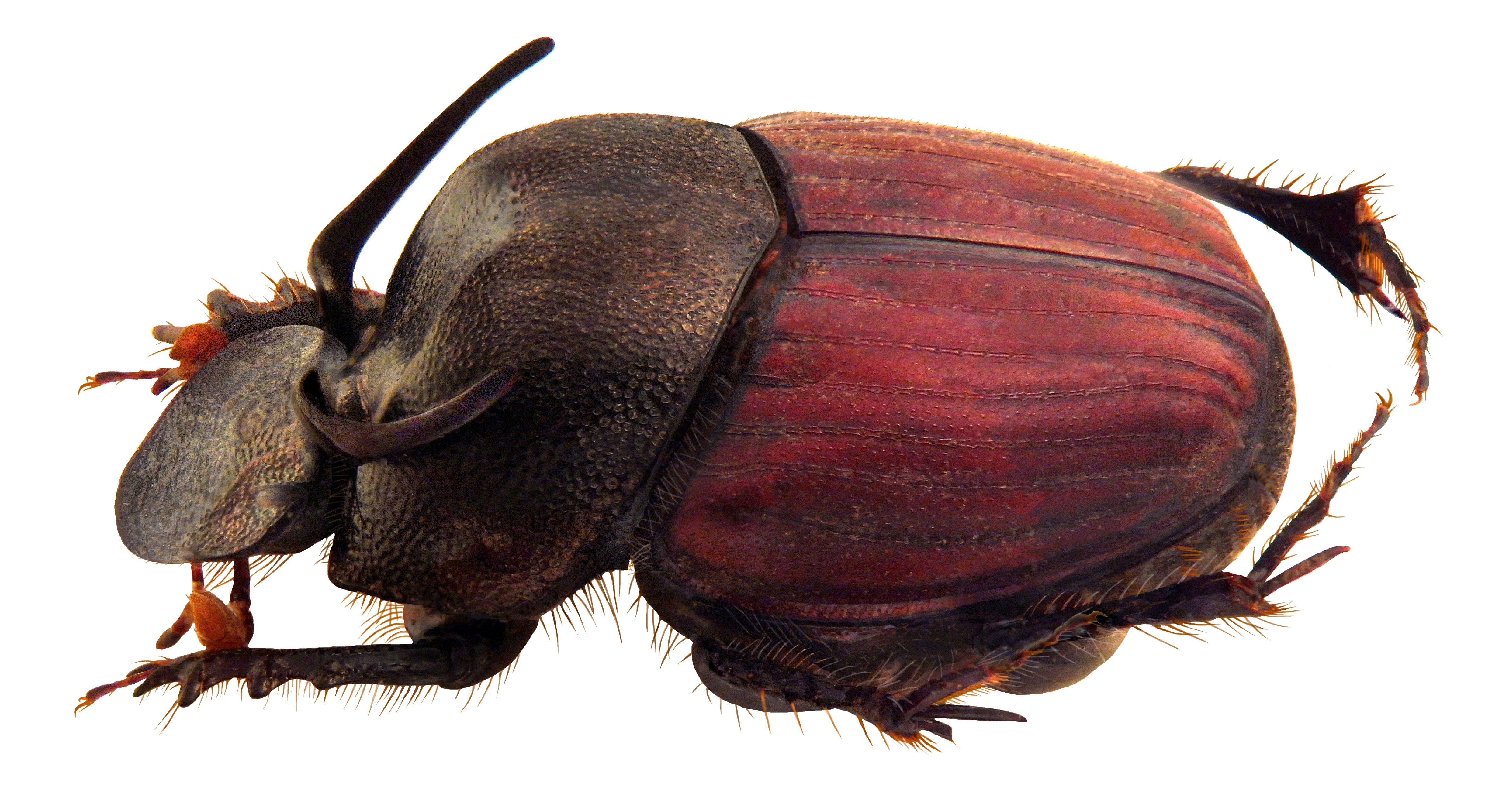 Familie: Scarabaeidae Groesse: 12,2 mm Fundort: Indien, Magalaya, 1900 m leg. Wittmer/Baroni, 1976; det. J.Scheuern, 1981 Photo: U.Schmidt, 2010